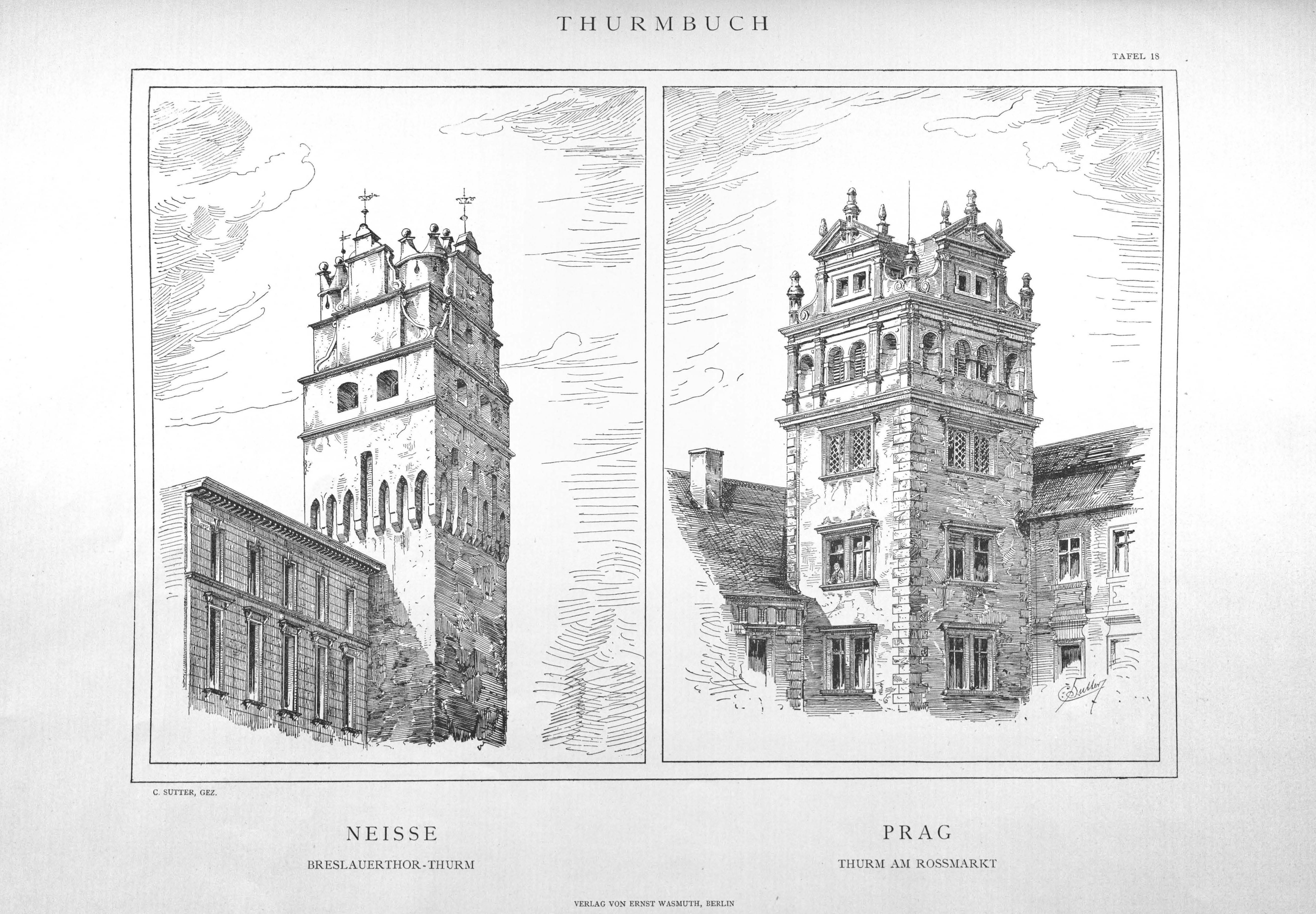 Nysa (Neisse), Breslauer Torturm; Prag, Turm am Rossmarkt (heute Wenzelsplatz). Tafel 18 aus Georg Sutter: Thurmbuch – Thurmformen aller Style und Laender. Verlag von Ernst Wasmuth. Berlin 1888.